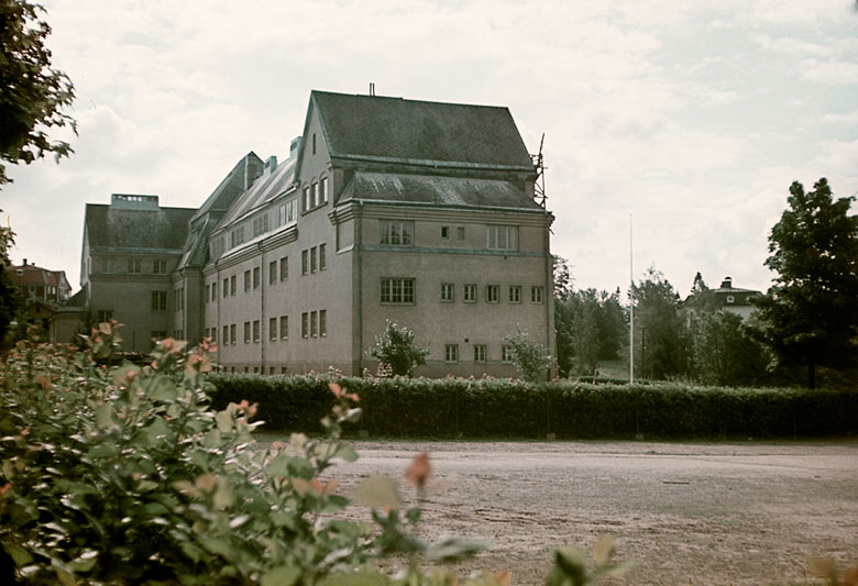 Läroverket i Hudiksvall från sydväst. Motiv: Hudiksvall Nyckelord: Riksintressen Kategori: StadsmiljöLäroverket i Hudiksvall från sydväst.